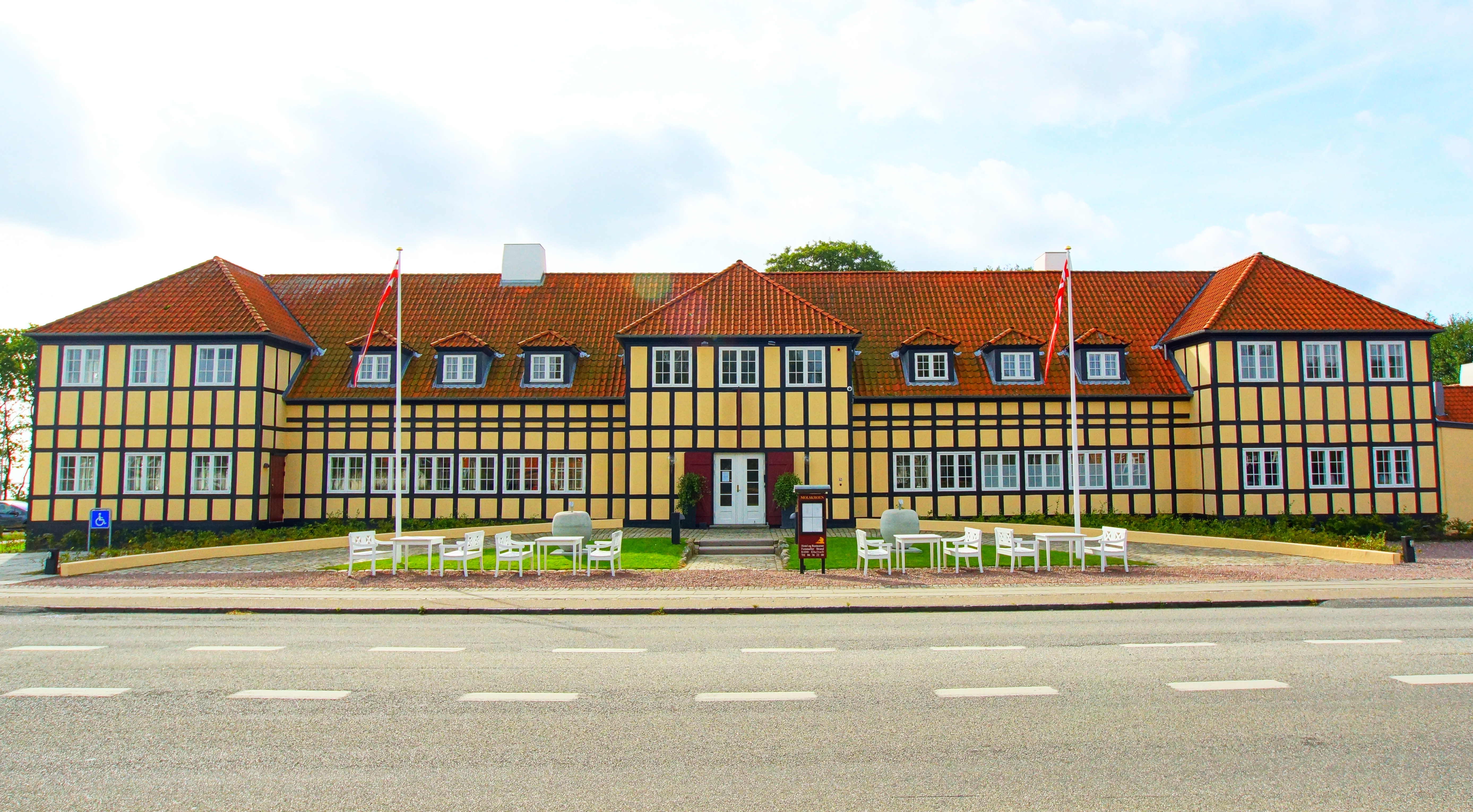 Indgang og front til Molskroen i Femmøller Strand. Tegnet og opført af arkitekt Egil Fischer.